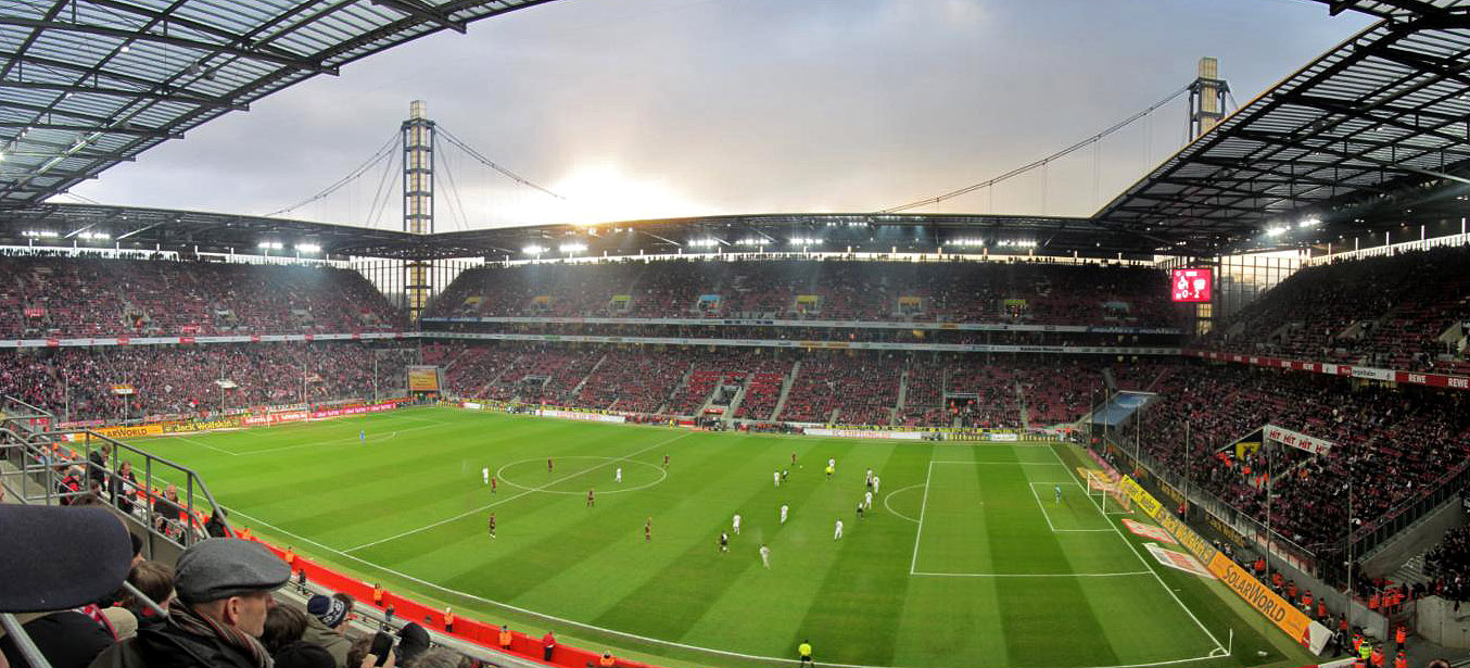 Rhein-Energie-Stadion 1. FC Köln - Bayer Leverkusen 0:2 25-Feb-2012 Stadionpanorama